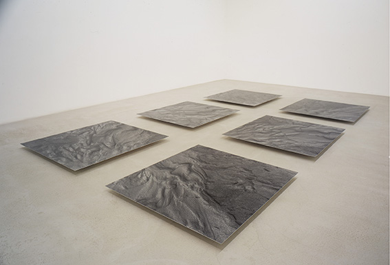 Hans Danuser, Erosion II – ein Bodeninstallation, 2000–2006, 6-teilig (II 1–II 6), Fotografie auf Barytpapier, je 150 x 140 cm, Bildinstallation im Fotomuseum Winterthur